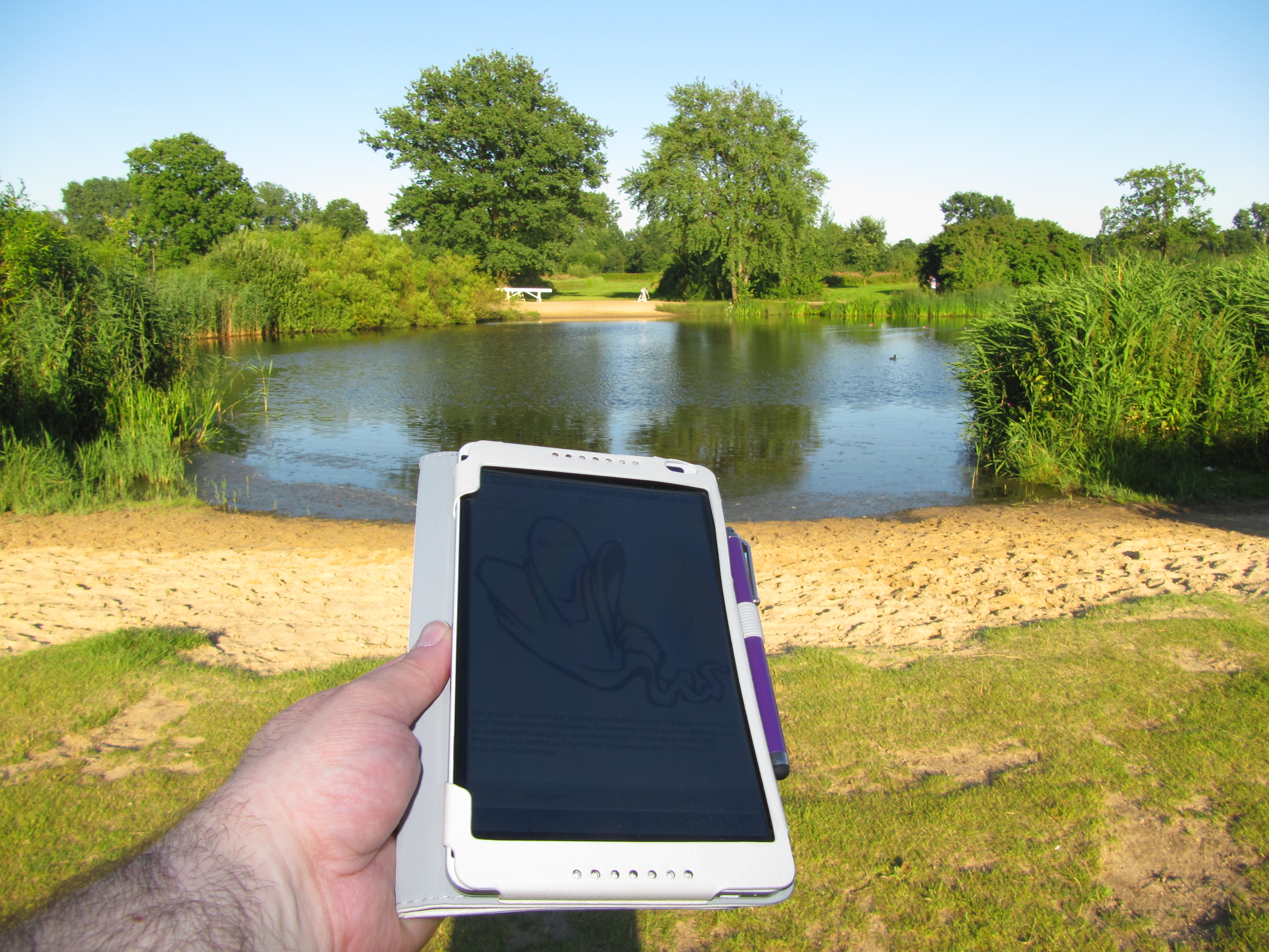 Wherigo-Cartridge_GC45K1D_vor_Ort_3